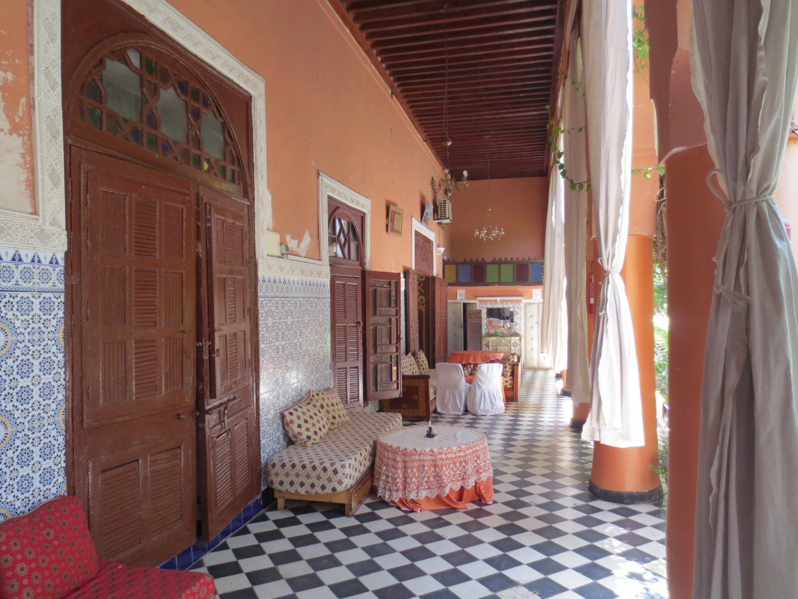 Riad au Maroc